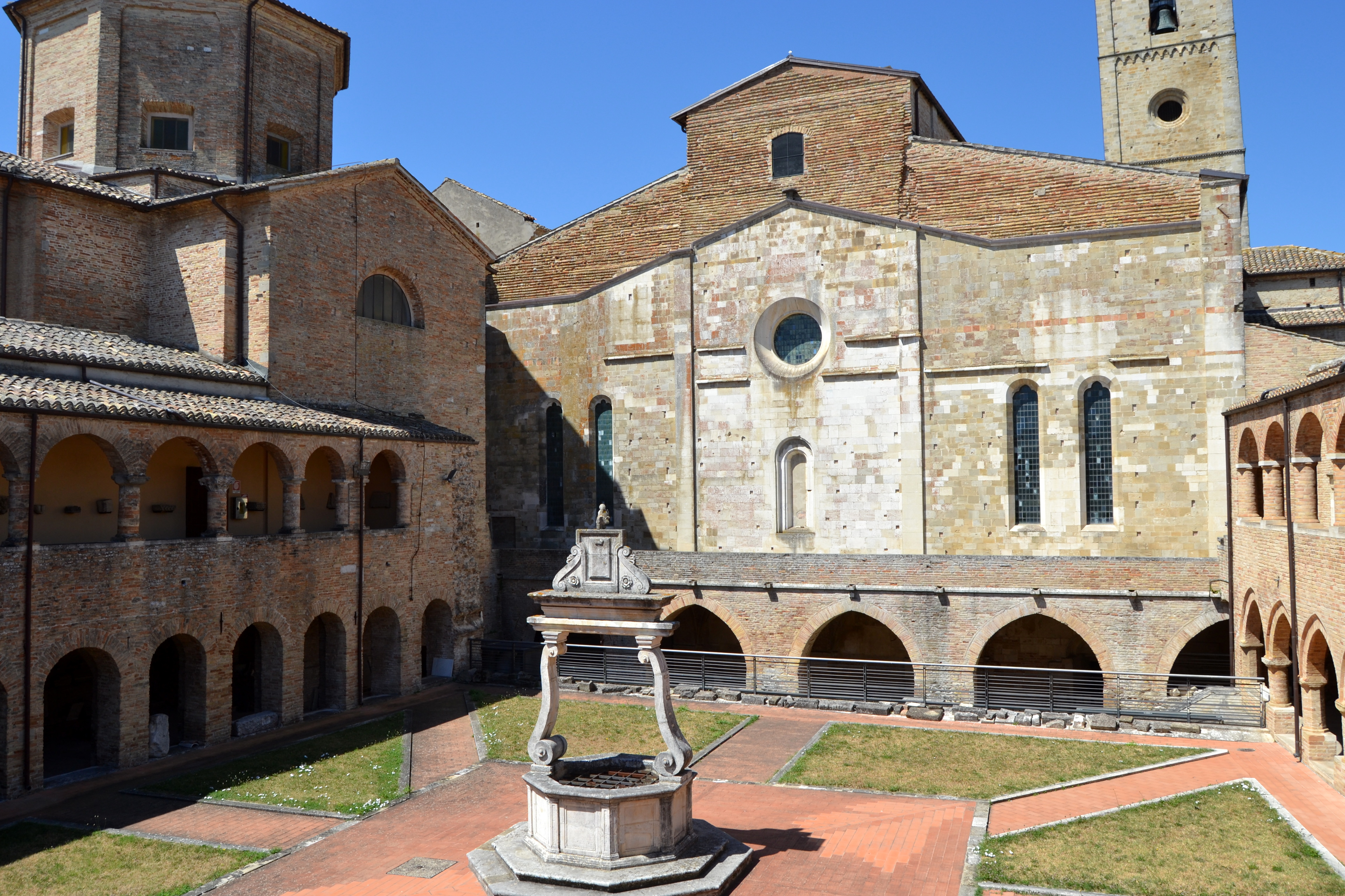 Concattedrale di Atri, chiostro (oggi adibito a Museo Capitolare)